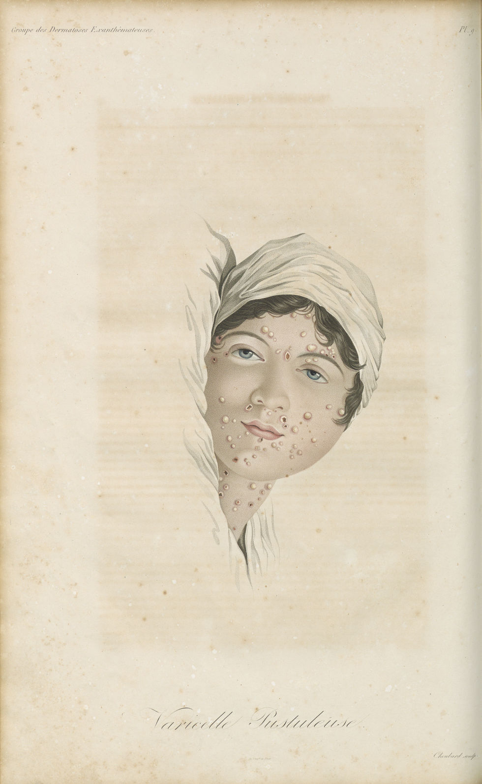 Réf. image MEDIC@ : med02221x0130 Accéder au document MEDIC@ Varicelle pustuleuse. Groupe des dermatoses exanthémateuses - Clinique de l'hôpital Saint-Louis ou traité complet des maladies de la peau Mots-clés : Dermatologie (peau). Hôpital Saint-Louis . 19e siècle Auteur de l'ouvrage : Alibert, Jean-Louis Ouvrage : Clinique de l'hôpital Saint-Louis ou traité complet des maladies de la peau Edition : Paris : Cormon et Blanc, 1833 Cote : 02221 Adresse permanente de cette image